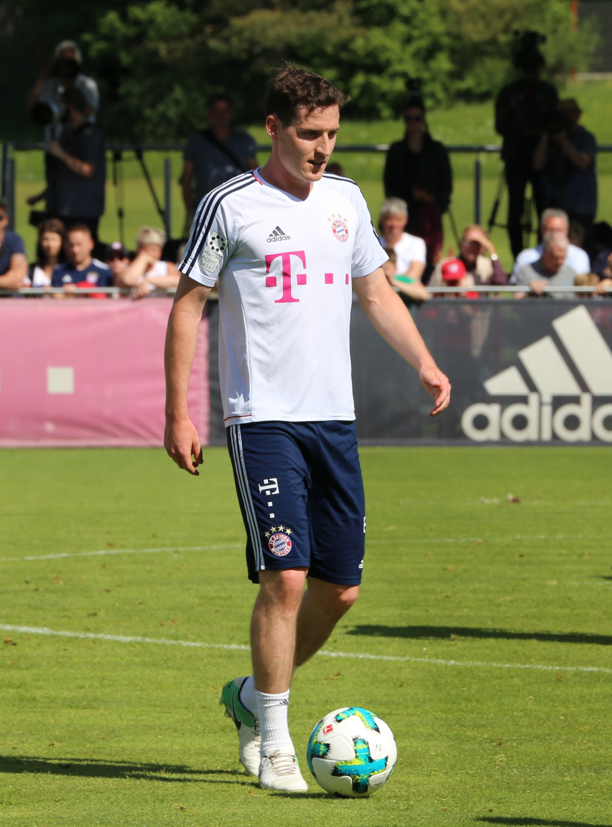 Sebastian Rudy, am 8. Mai 2018 beim Training auf dem Gelände des FC Bayern München